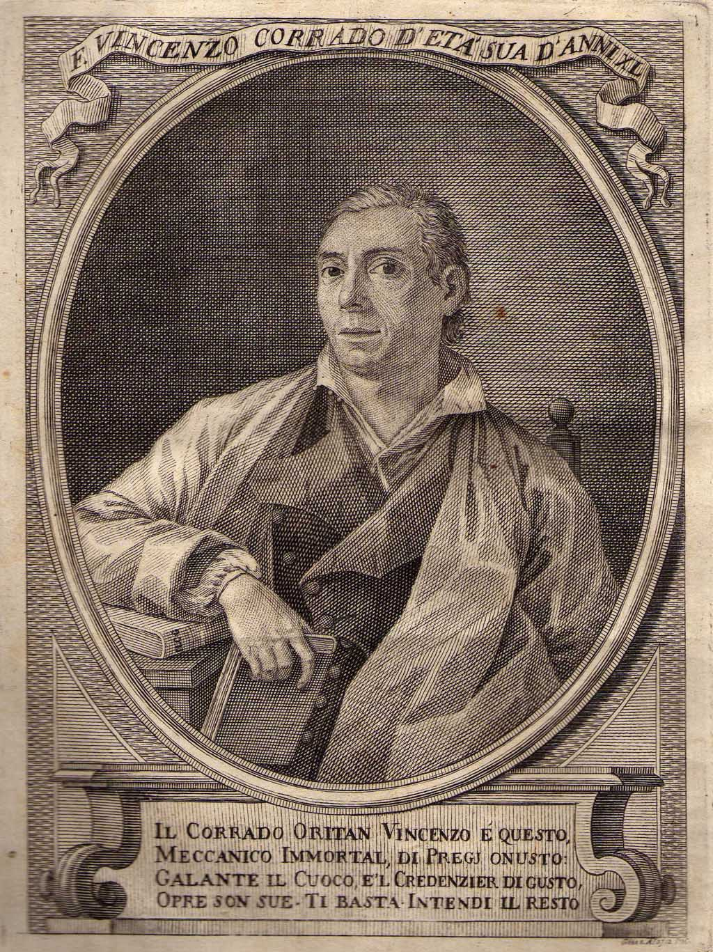 ritratto dell' autore tratto dall'antico libro del 1773 scritto dallo stesso il cuoco galante